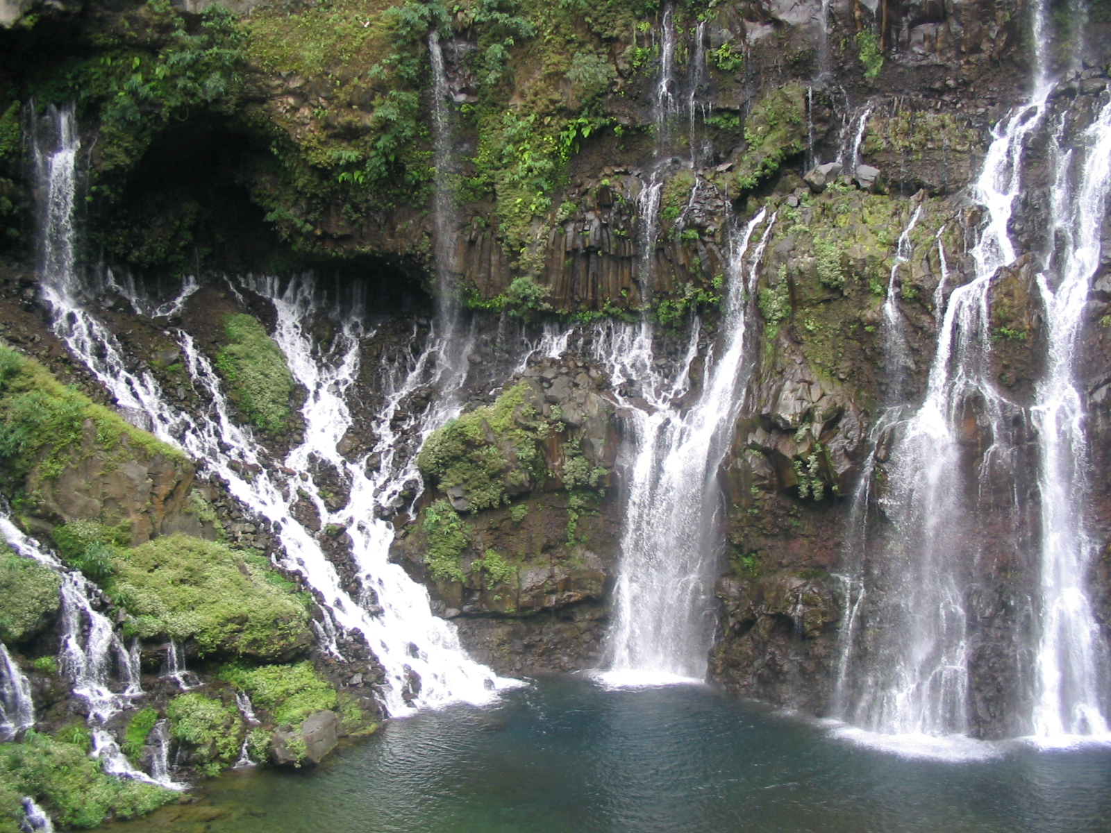 Cascade Langevin, Réunion